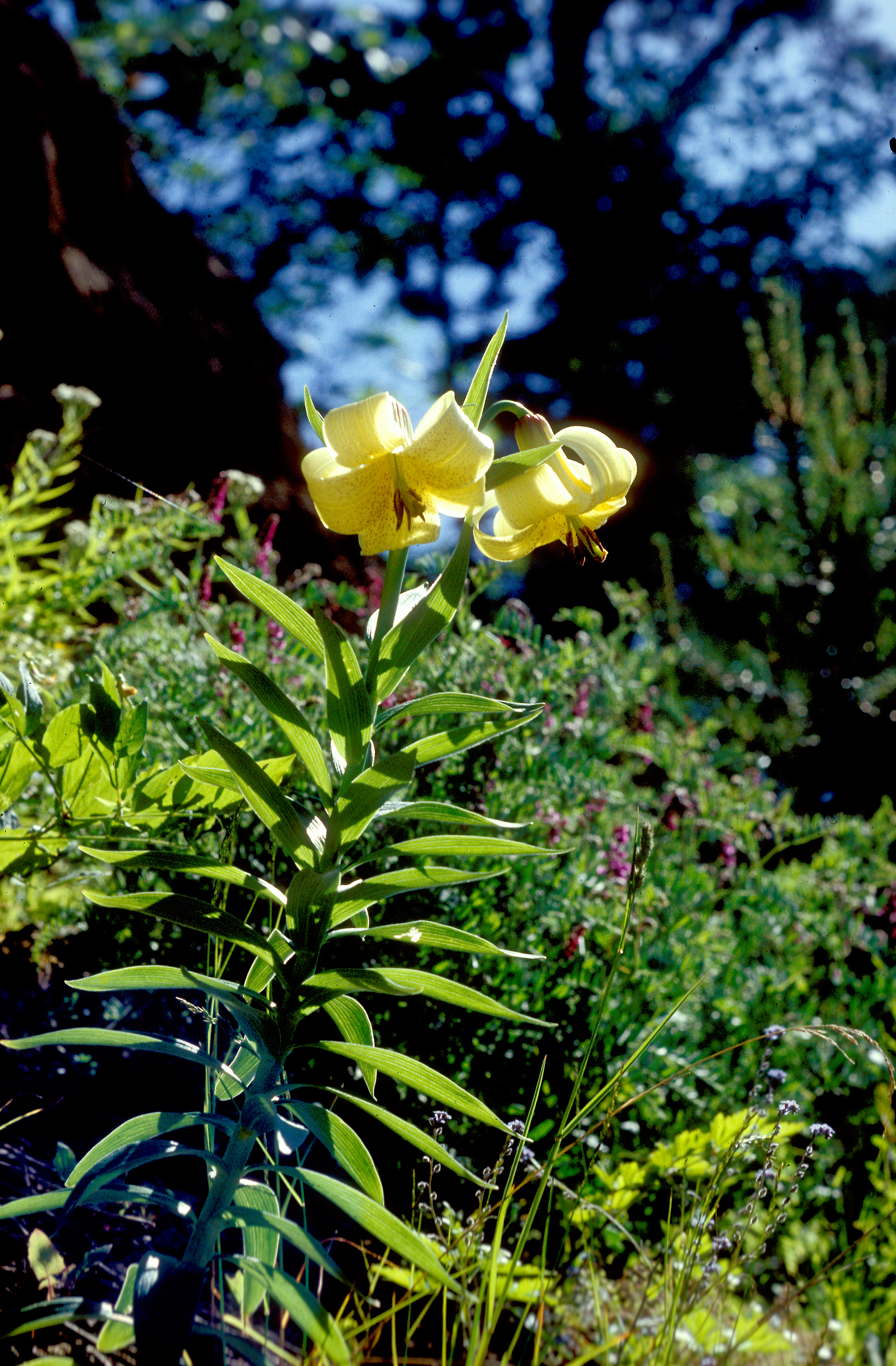 Lilium monadelphum var. armenum in habitat at Zigana Pass, Turkey